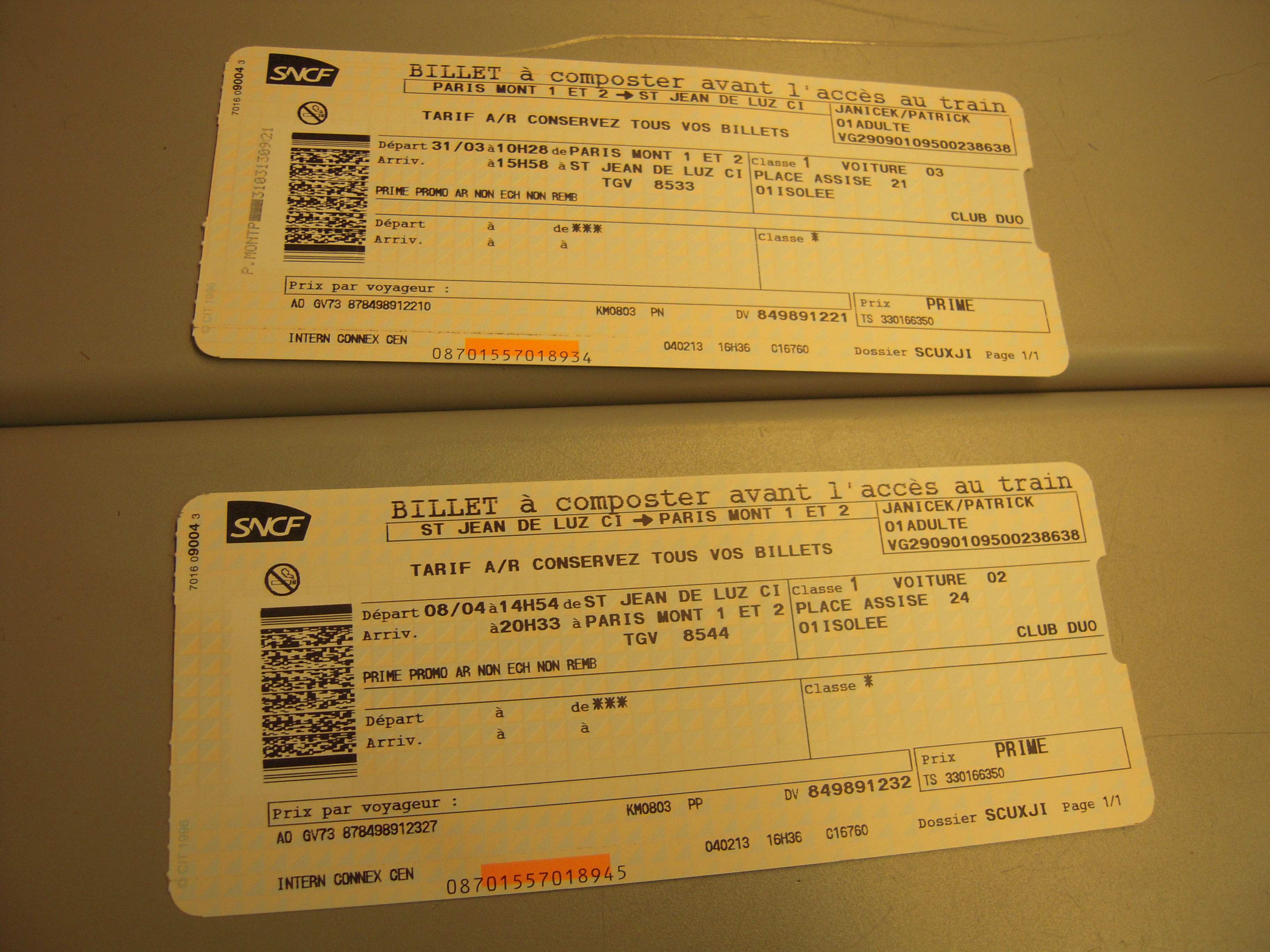 Grâce au système de point-monnaie, institué par la SNCF en remplacement du programme S'Miles, il est possible d'obtenir des voyages gratuits pour la destination de son choix !